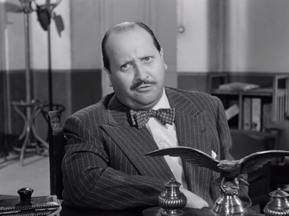 Screenshot dal film Accadde al commissariato (1954)